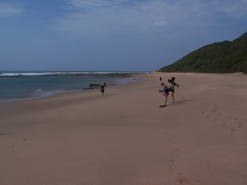 Beach